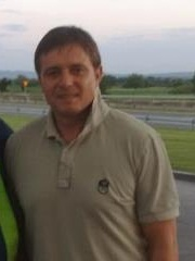 Драган Стојковић Пикси